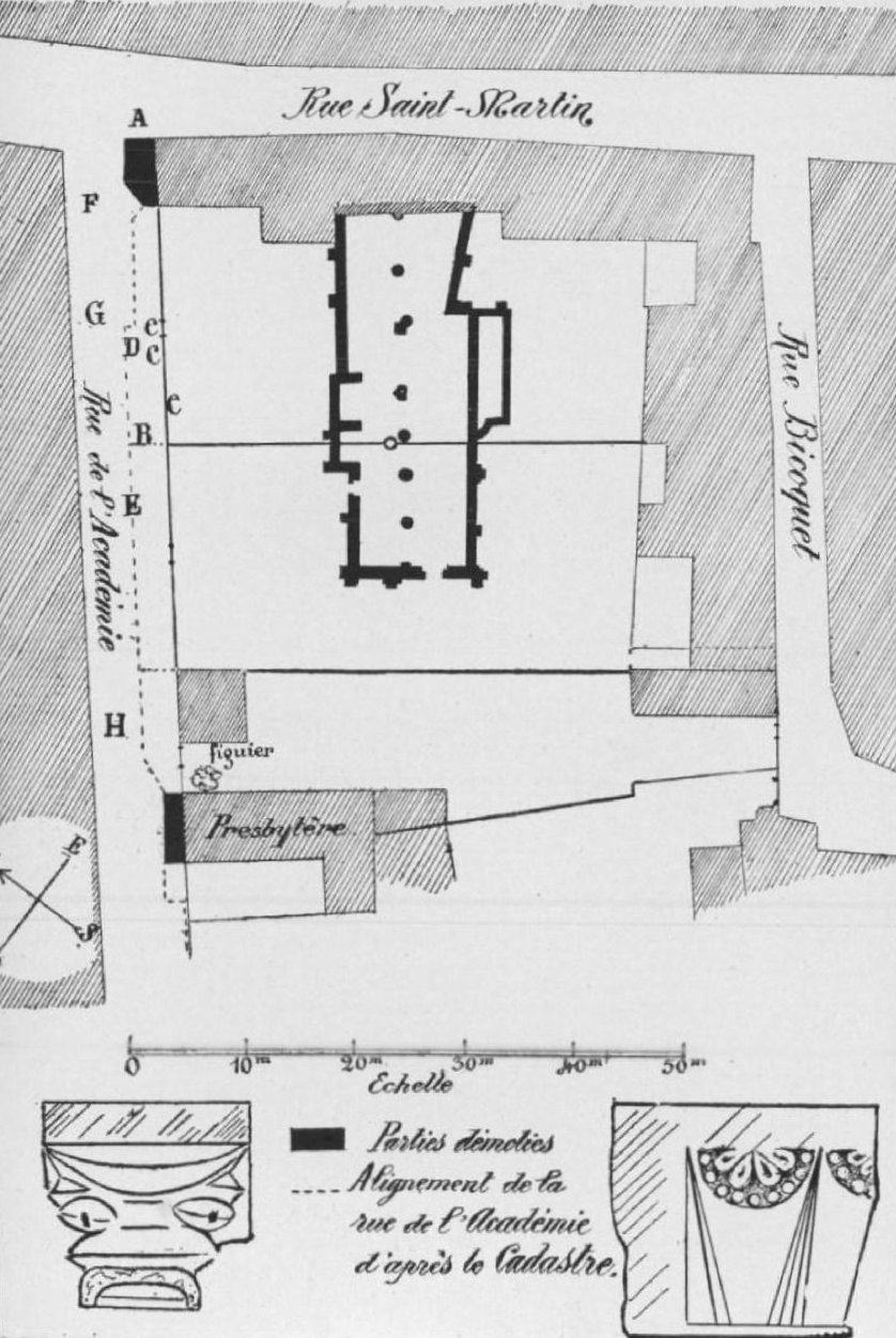 plan des fouilles du cimetière de l’église Saint-Martin de Caen dans les années 1850. A - Maison détruite pour élargir la rue de l’Académie. B - Fin des travaux d’élargissement de 1855. C-D - Cercueils exhumés. E - Trou donnant dans une ancienne carrière. F-G - Sablon et terre retournée retrouvés pendant les travaux de pose de canalisations en 1858. H - Fin du cimetière.